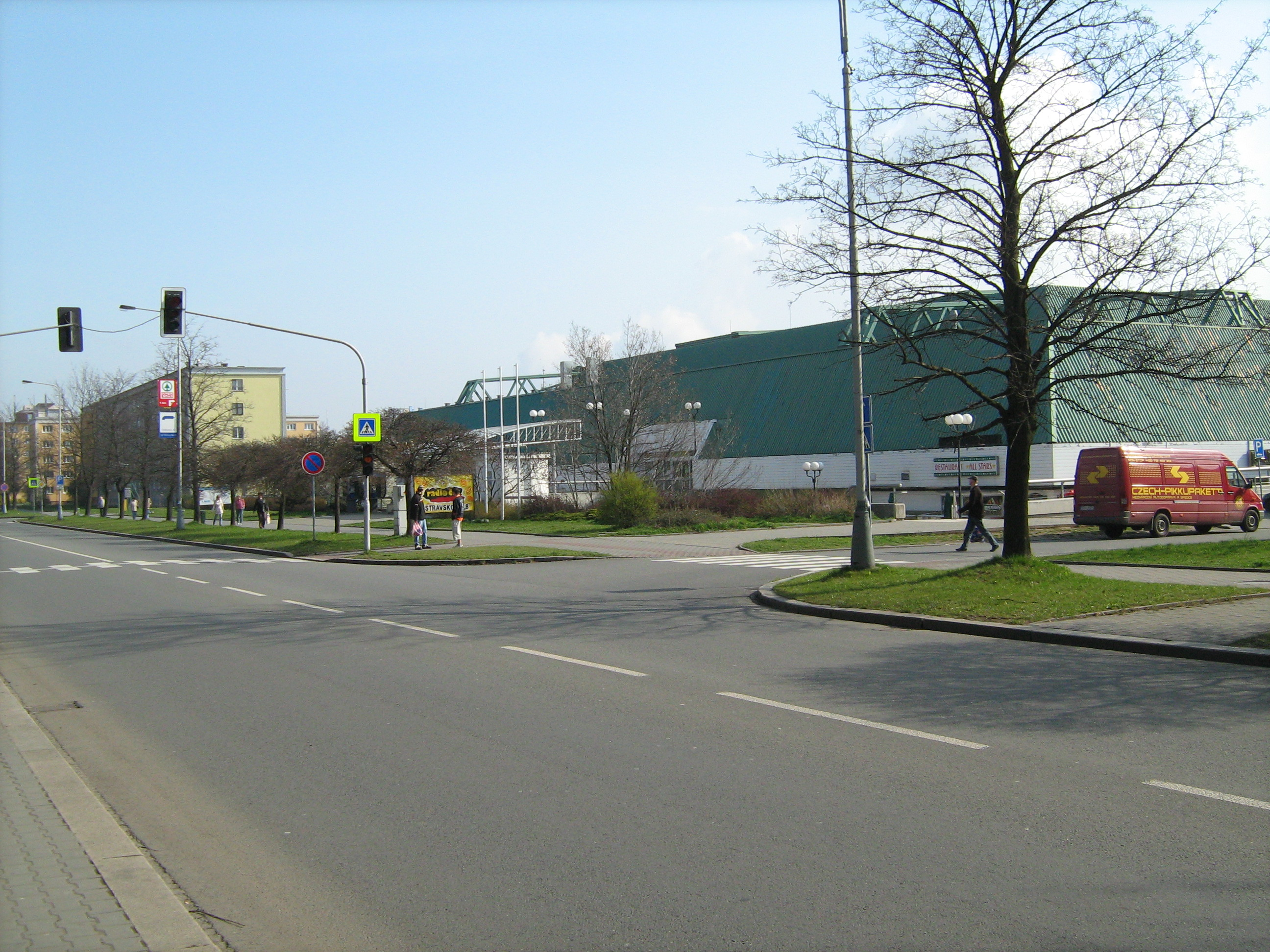 Zimní stadion klubu HC Sareza Ostrava na Porubské ulici v Ostravě-Porubě ; Ice-stadium of HC Sareza Ostrava, Porubská street